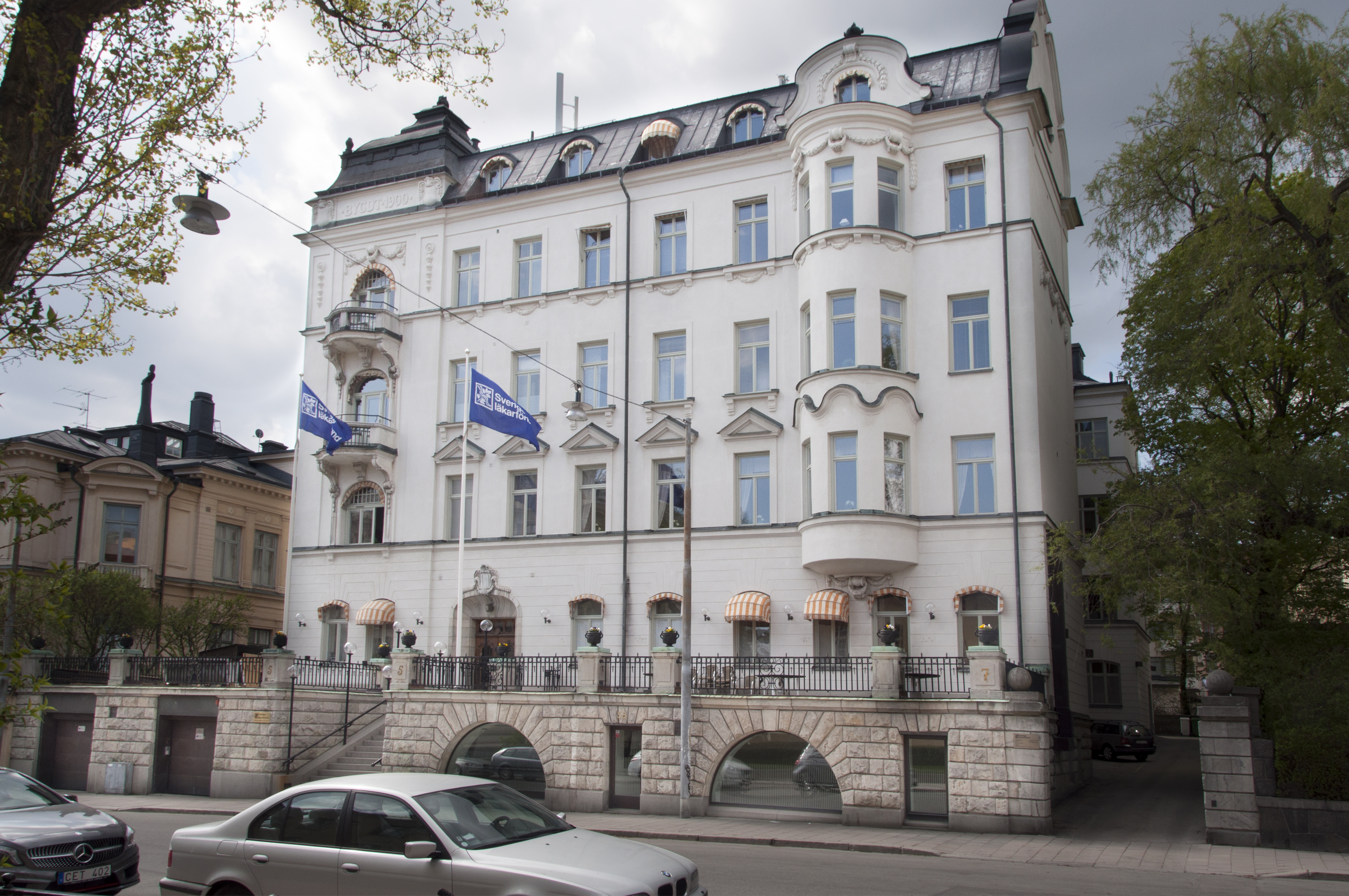 Eken 7, Villagatan 5-7, Byggnadsår 1899-1901, arkitekter Dorph & Höög, byggherrar J Wersén och J P Pettersson, byggmästare P A Wersén